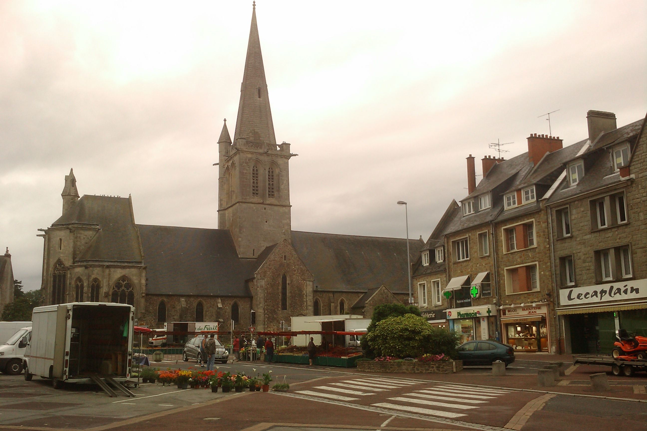 Photo de l'église de Périers